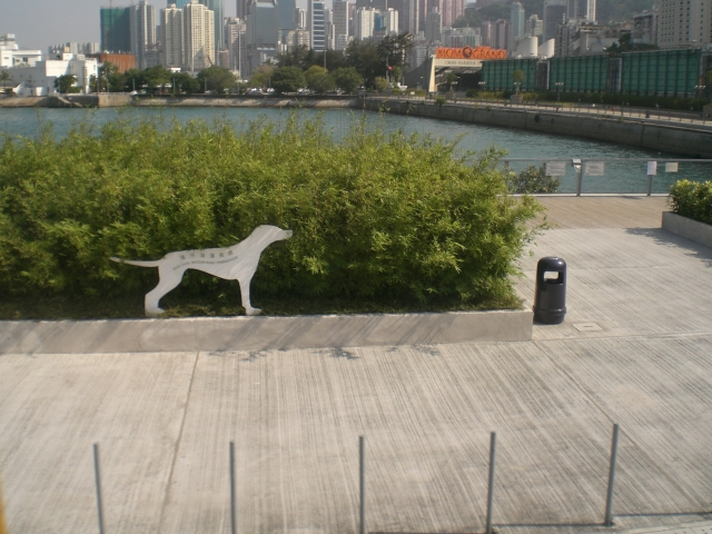 灣仔北鴻興道灣仔海濱長廊